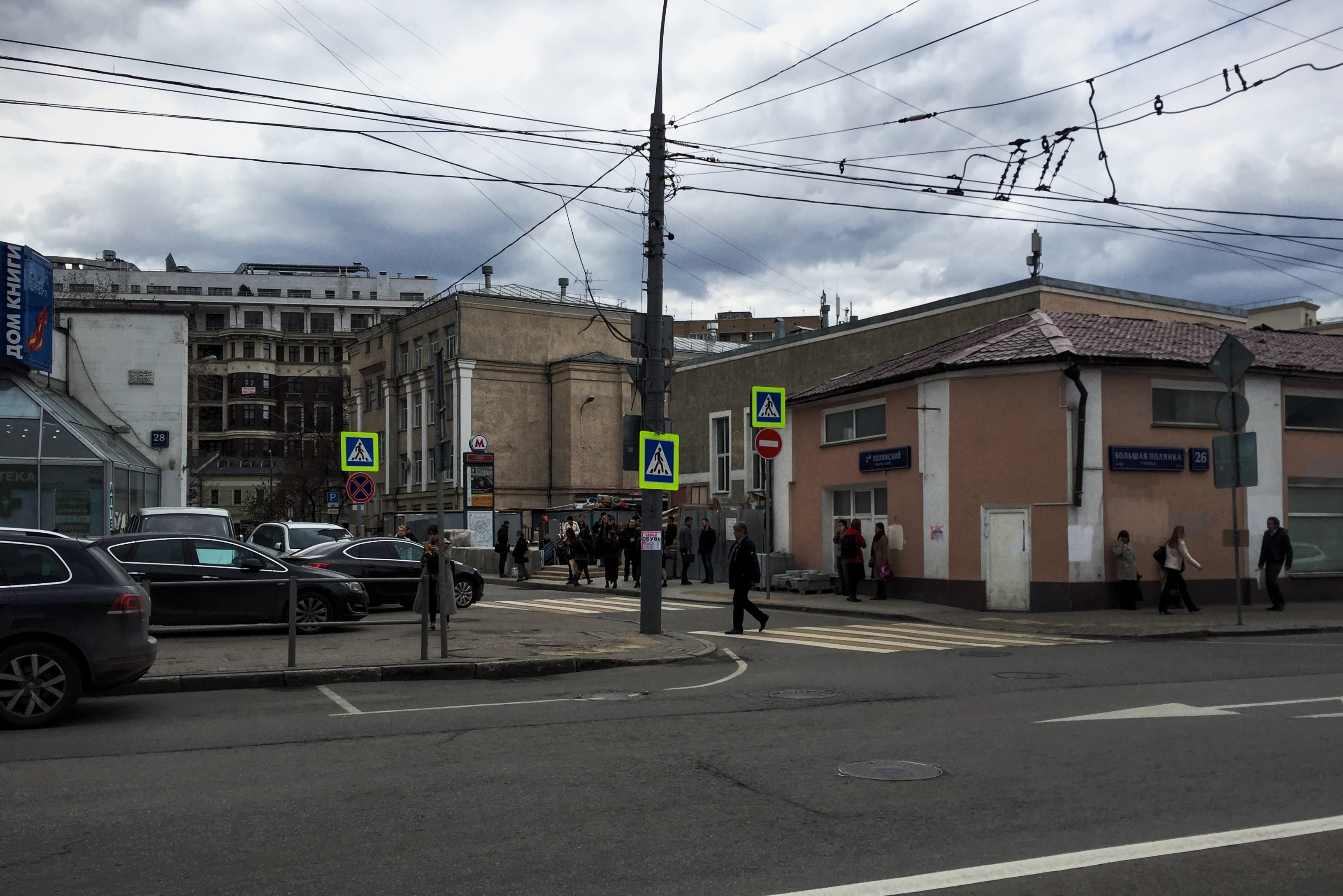 Большая Полянка, угол 2-го Полянского переулка